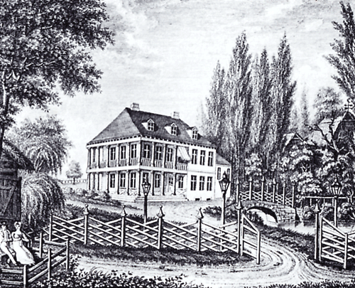 Landhaus von Caspar Voght in Hamburg-Klein-Flottbeck. Stahlstich von L. Wolf aus dem Jahre 1805.